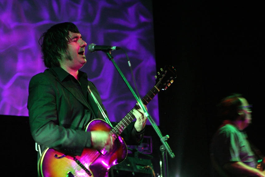 Álvaro Henríquez Pettinelli (* Concepción, 18 de octubre de 1969) es un músico chileno. Líder de las bandas Los Tres, Pettinellis, y solista. Su música ha sido una de las más influyentes en la escena musical chilena durante la década de 1990 y la de 2000.